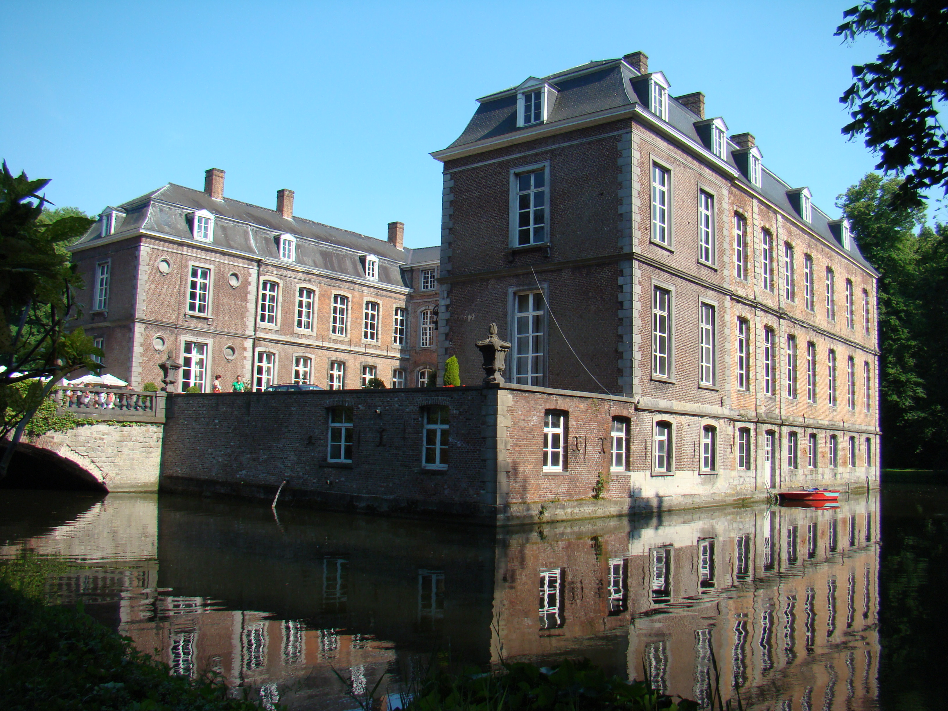 Kasteel naast de markt van Ingelmunster Castle next the market of Ingelmunster, West Flanders, Belgium